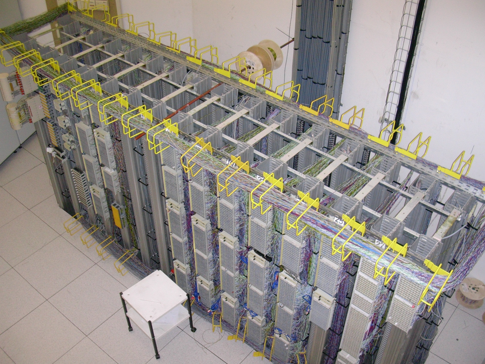 Jarretière téléphonie